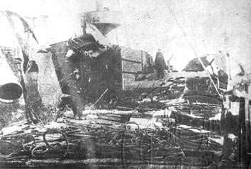 Палуба китайского броненосца после боя при Ялу